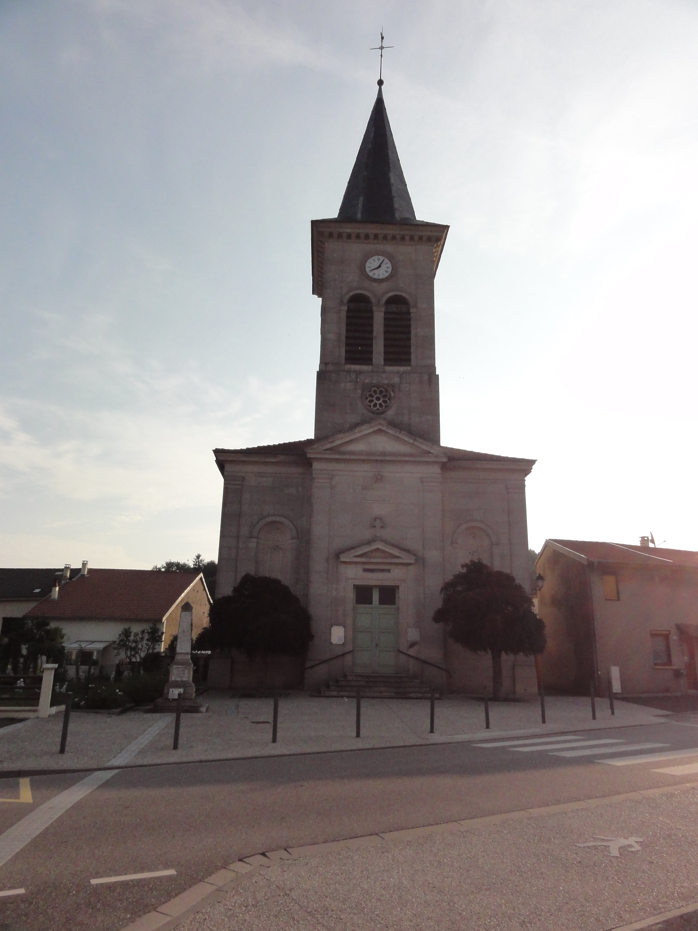 Lay-Saint-Remy (Meurthe-et-M.) église